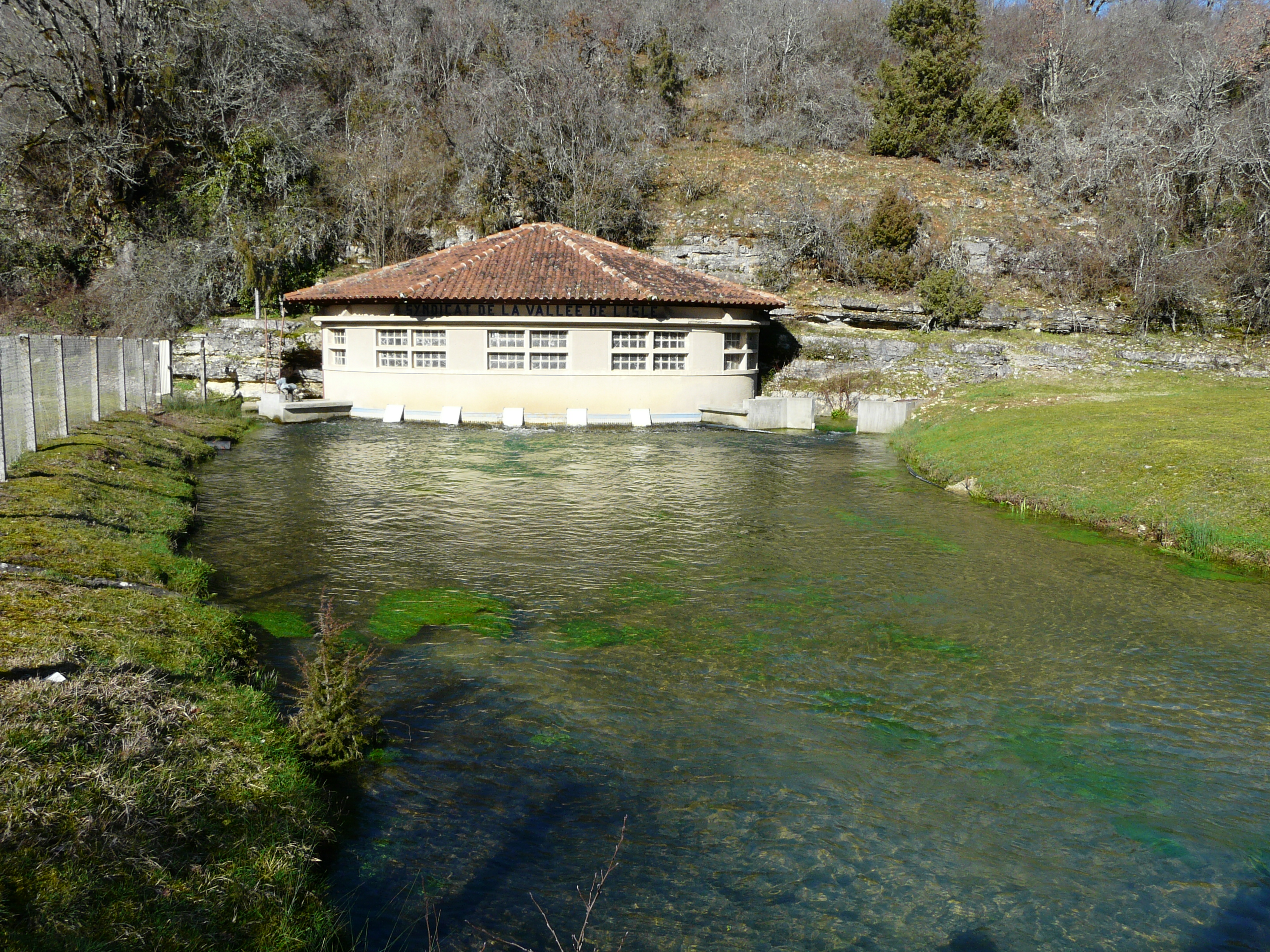 Le bâtiment de captage des eaux de la Glane, Saint-Jory-las-Bloux, Dordogne, France.